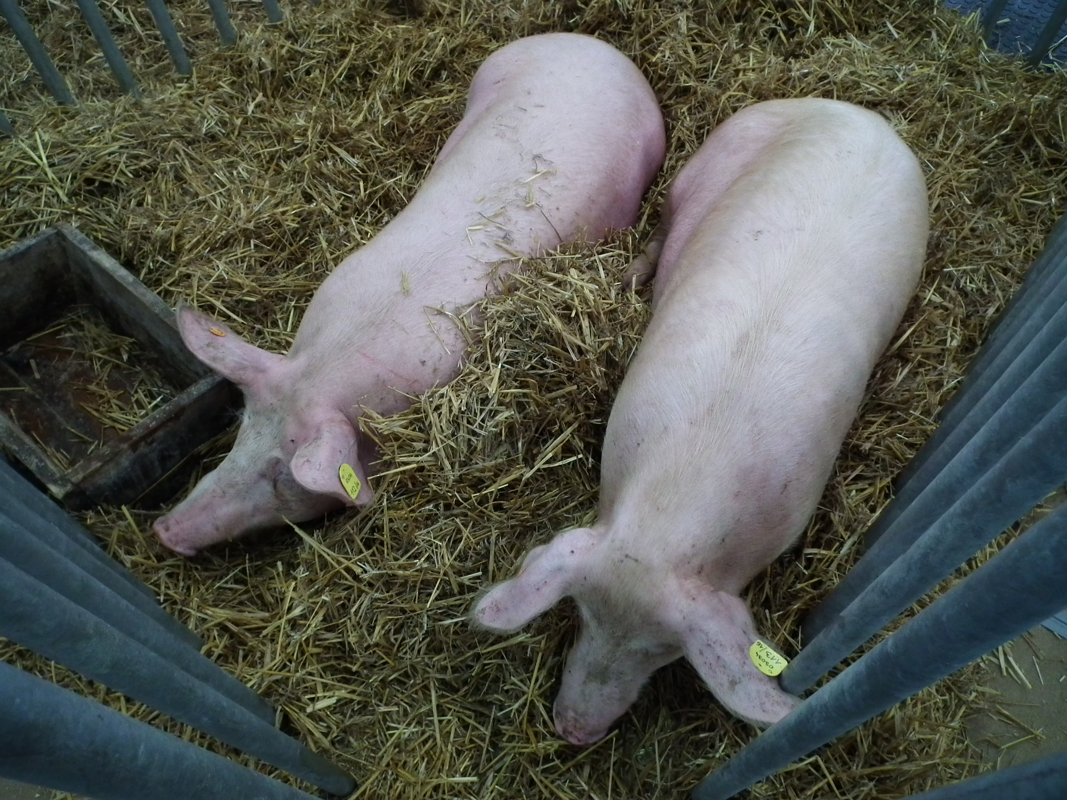 Świnia rasy złotnicka biała.